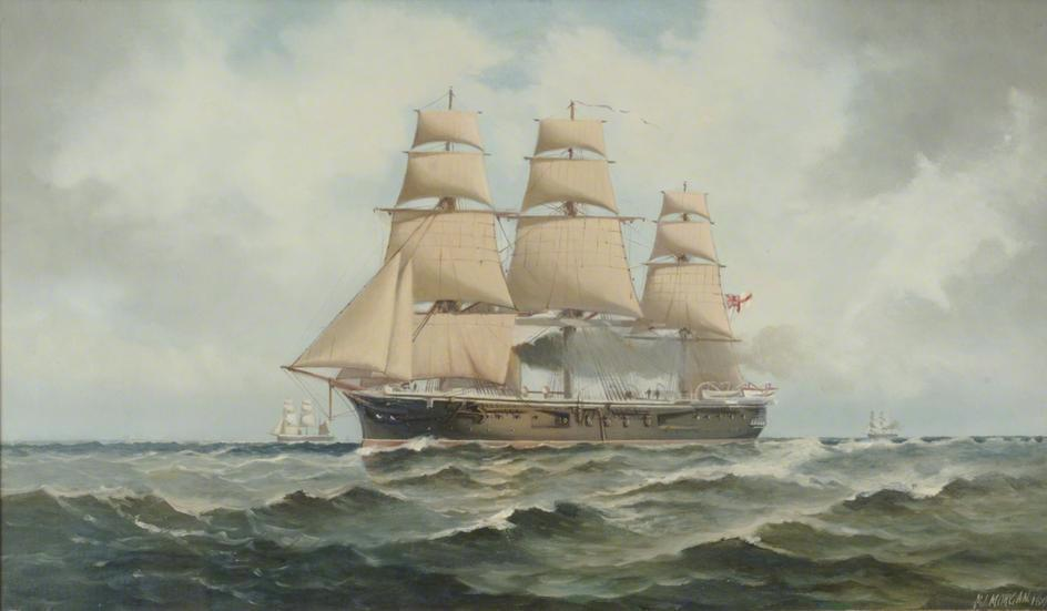 HMS 'Penelope'